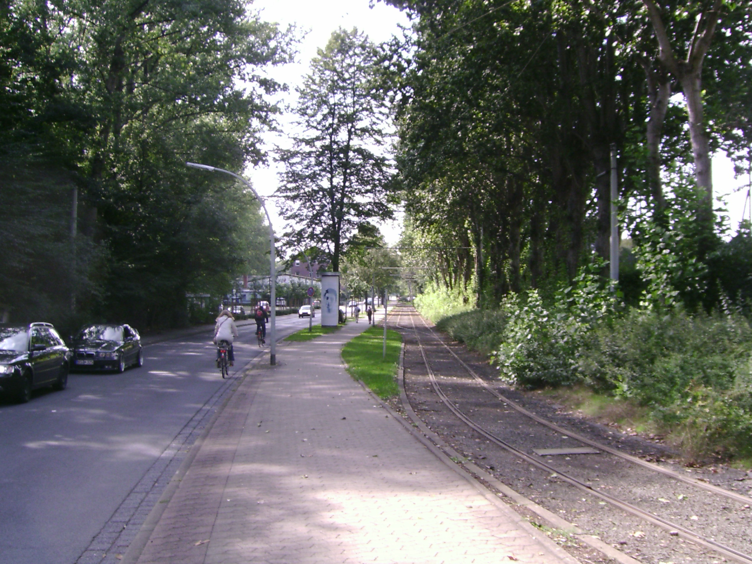 Die Eisenbütteler-Straße mit Gleis